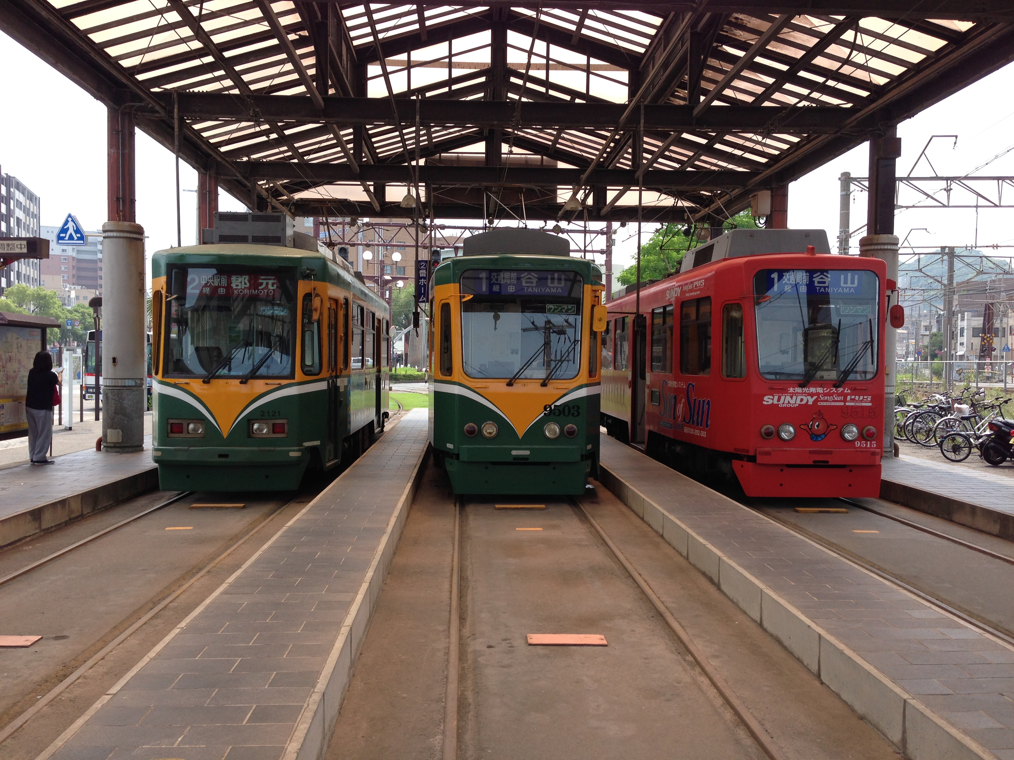 鹿児島駅前電停